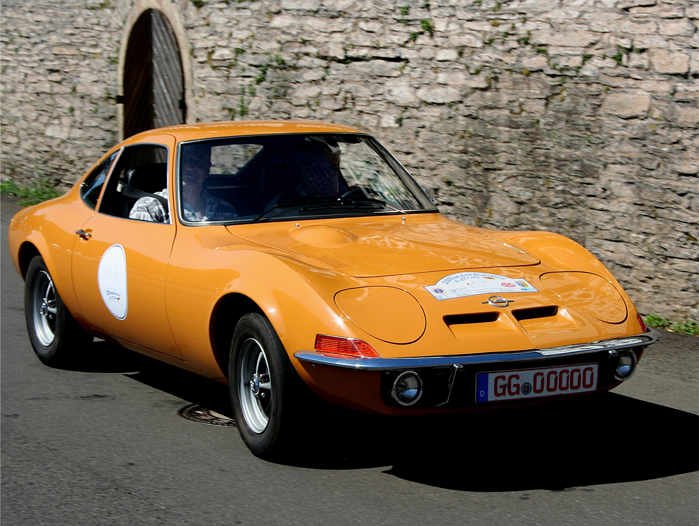 Opel GT bei der Oldtimer-Rallye „2000 km durch Deutschland“ in Traben-Trarbach